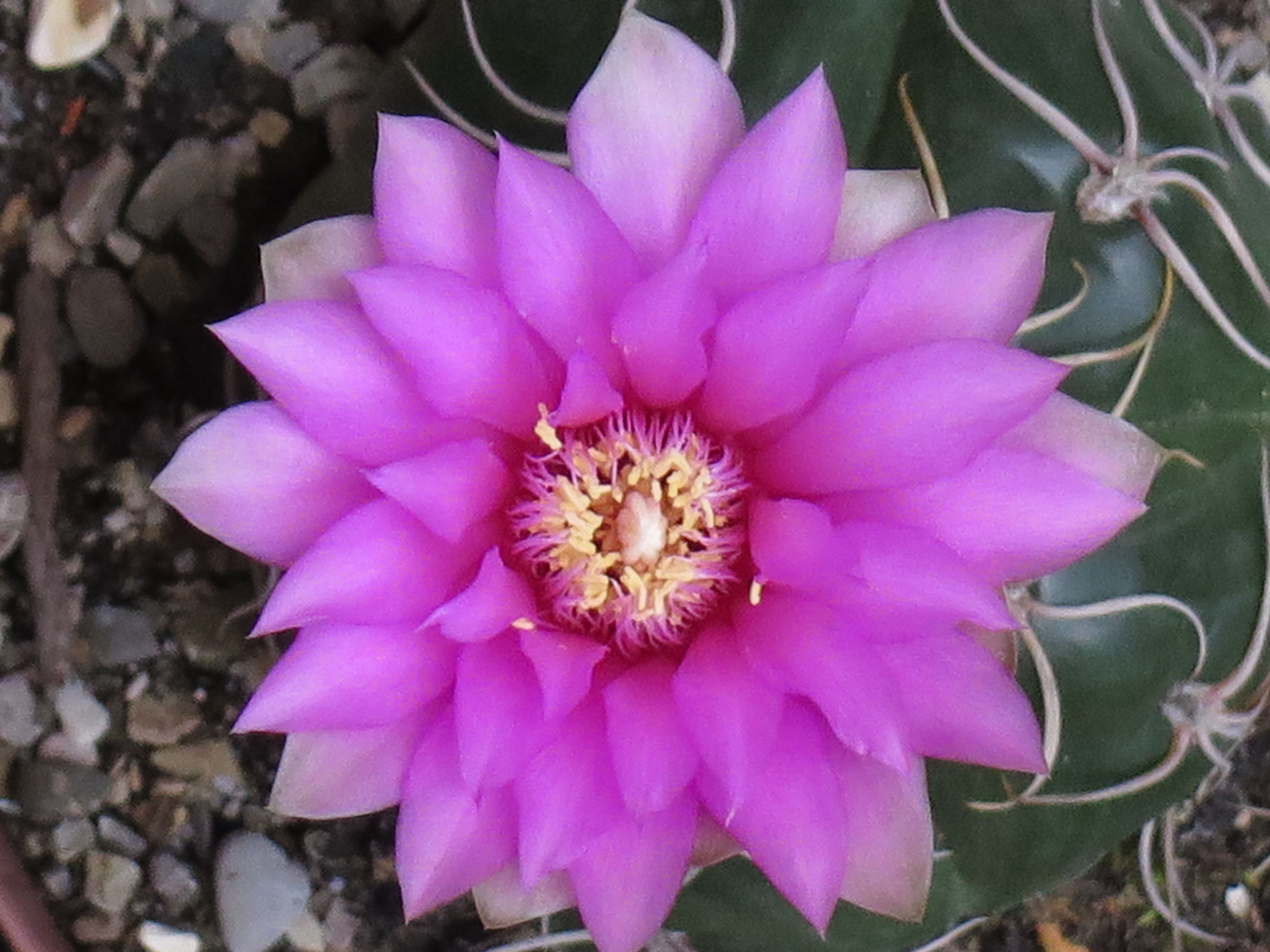 Il fiore del gymnocalycium denudatum